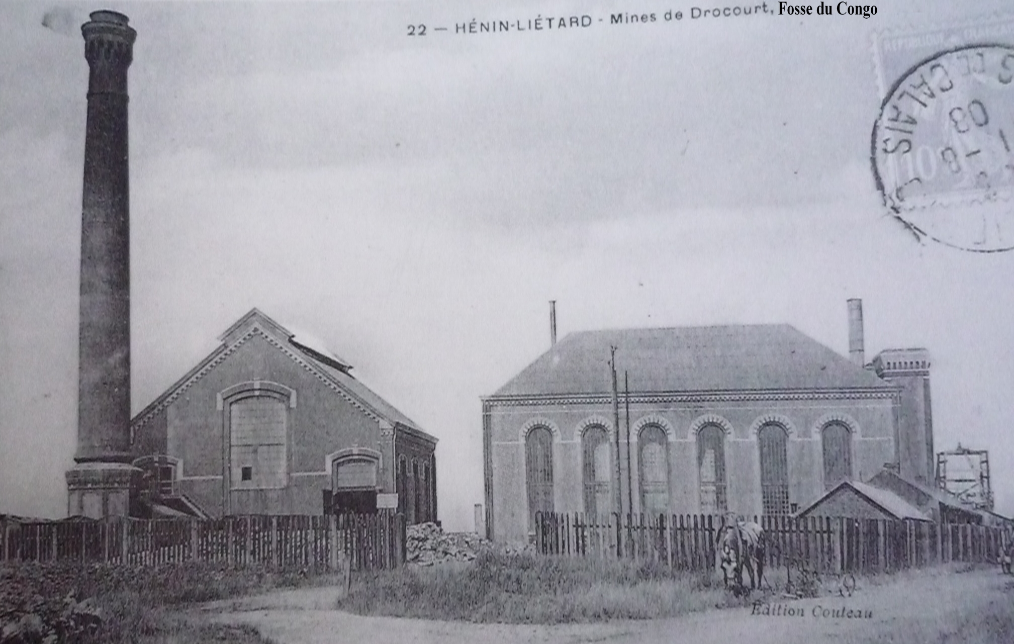 La Fosse n° 3 dite Congo de la Compagnie des mines de Drocourt était un charbonnage constitué d'un seul puits situé à Hénin-Beaumont, Pas-de-Calais, Nord-Pas-de-Calais, France.